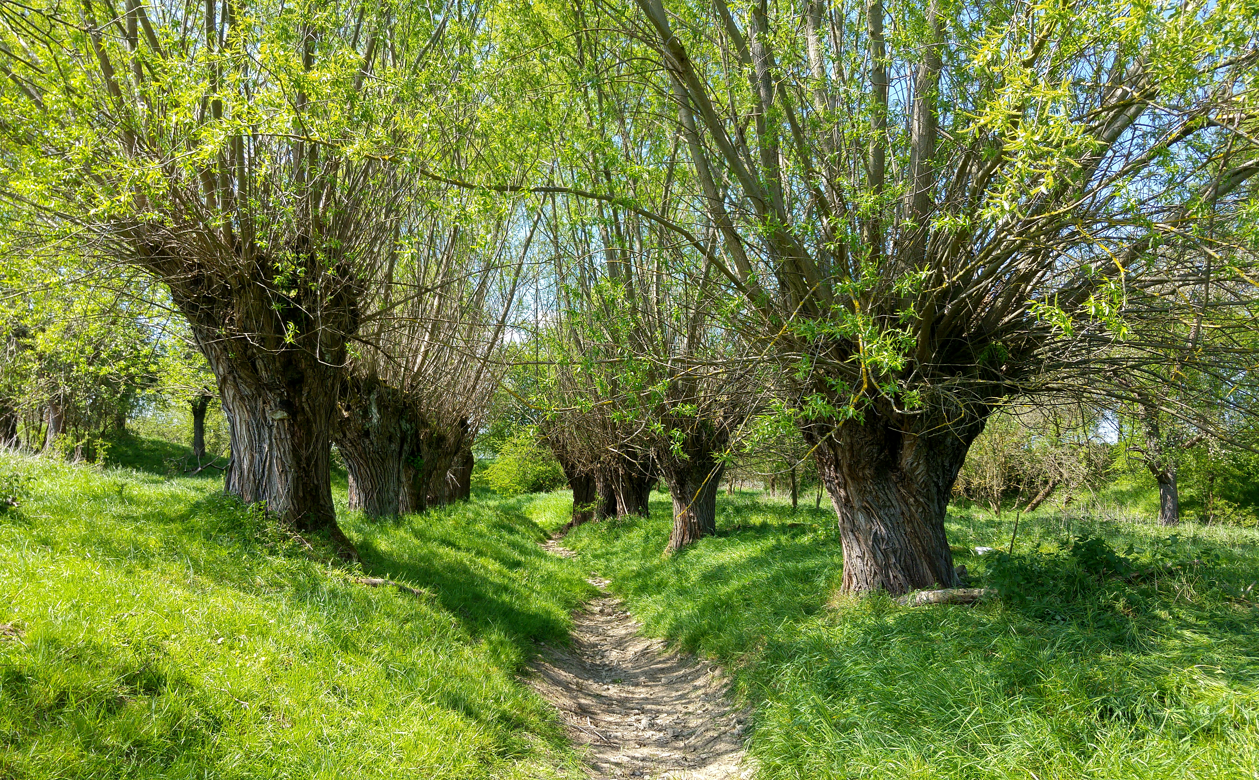 Aufgrund günstiger Versickerungsbedingungen im klüftigen Untergrund und fehlenden Niederschlag trockengefallener Hellerbach gerahmt von typischen Kopfweiden; NSG 328 Zimmerbachtal-Hellerbachtal